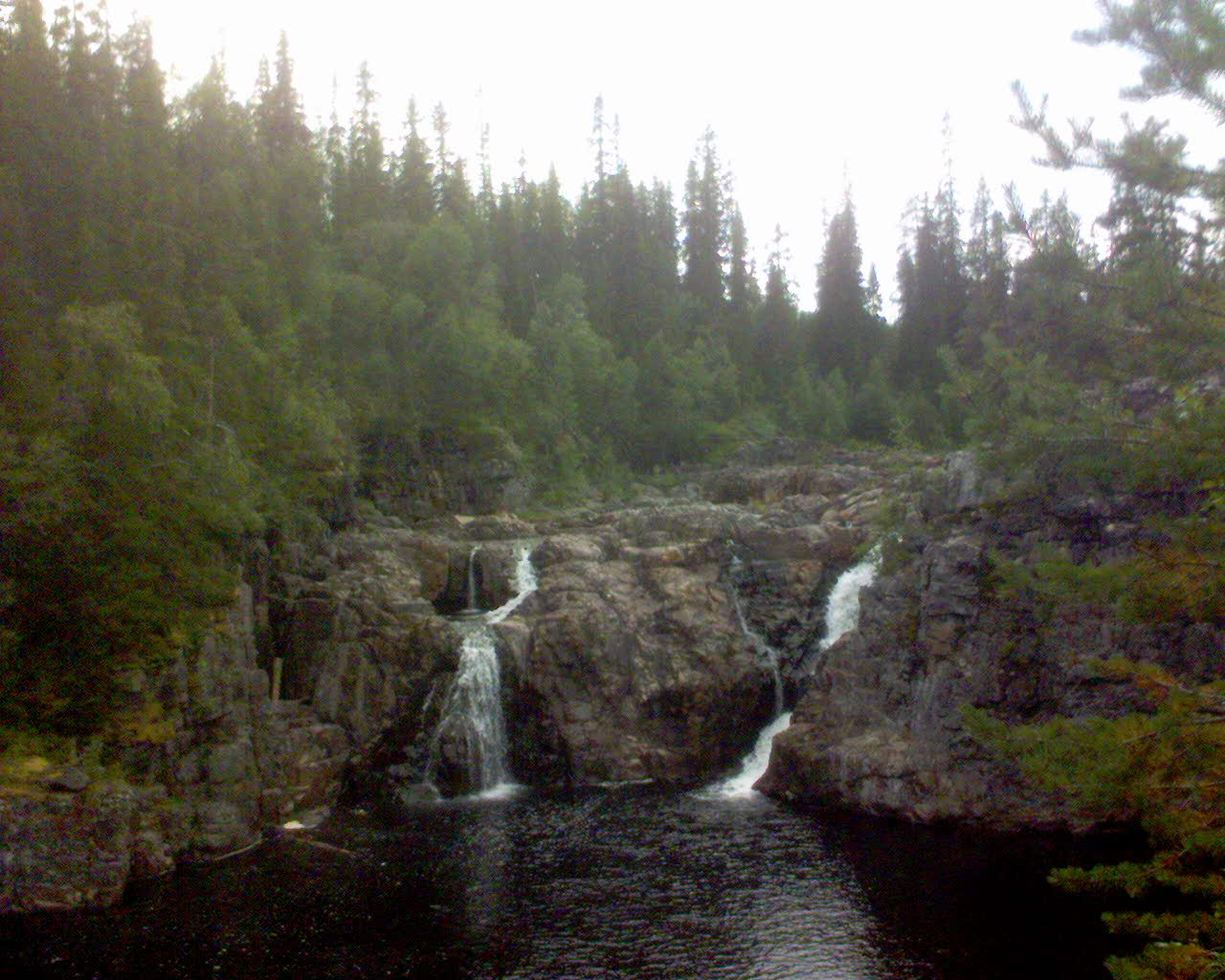 Mittåfallet under sensommaren. Foto:Emil Åslund